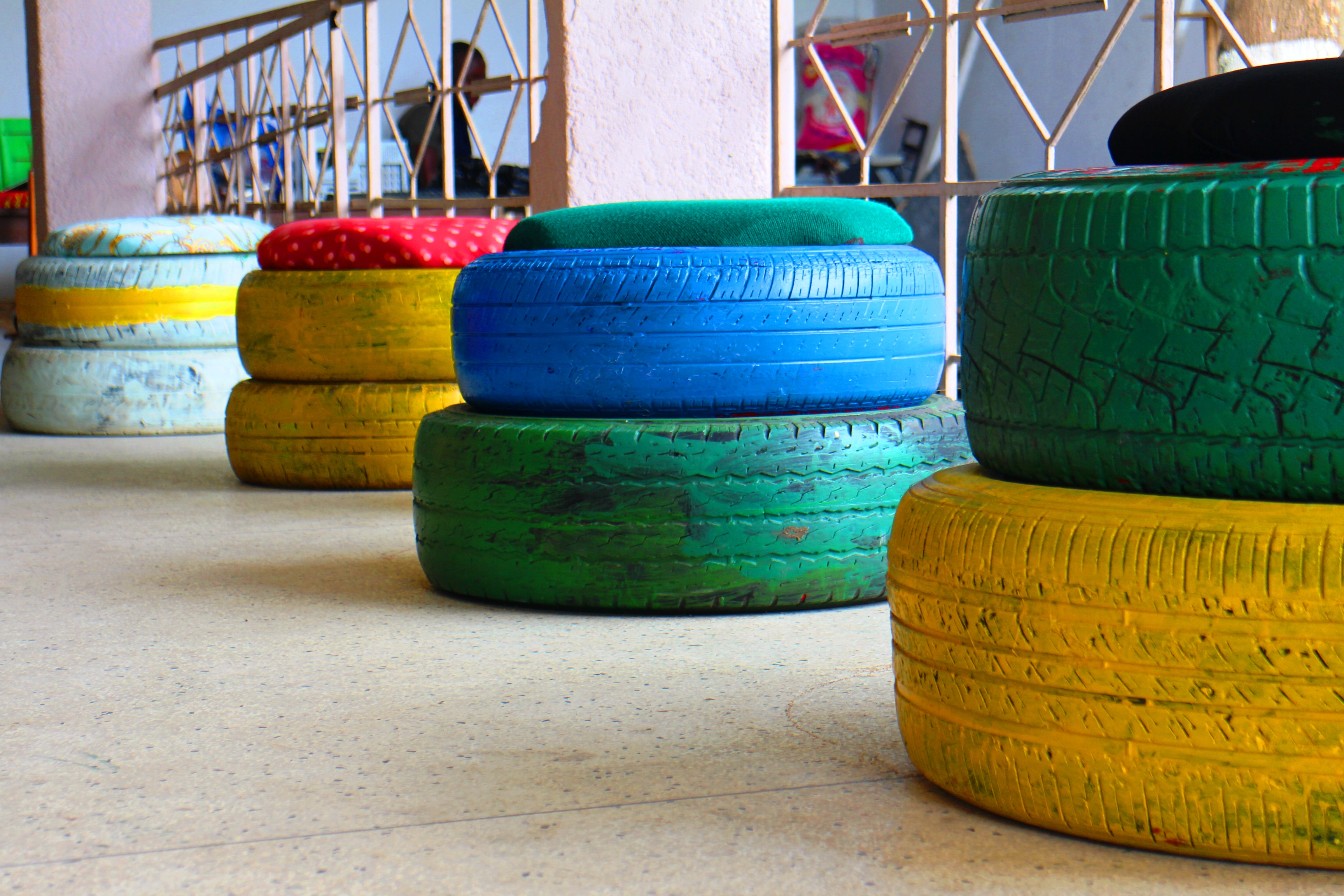 recyclage de vieux pneus pour en faire des fauteuils.